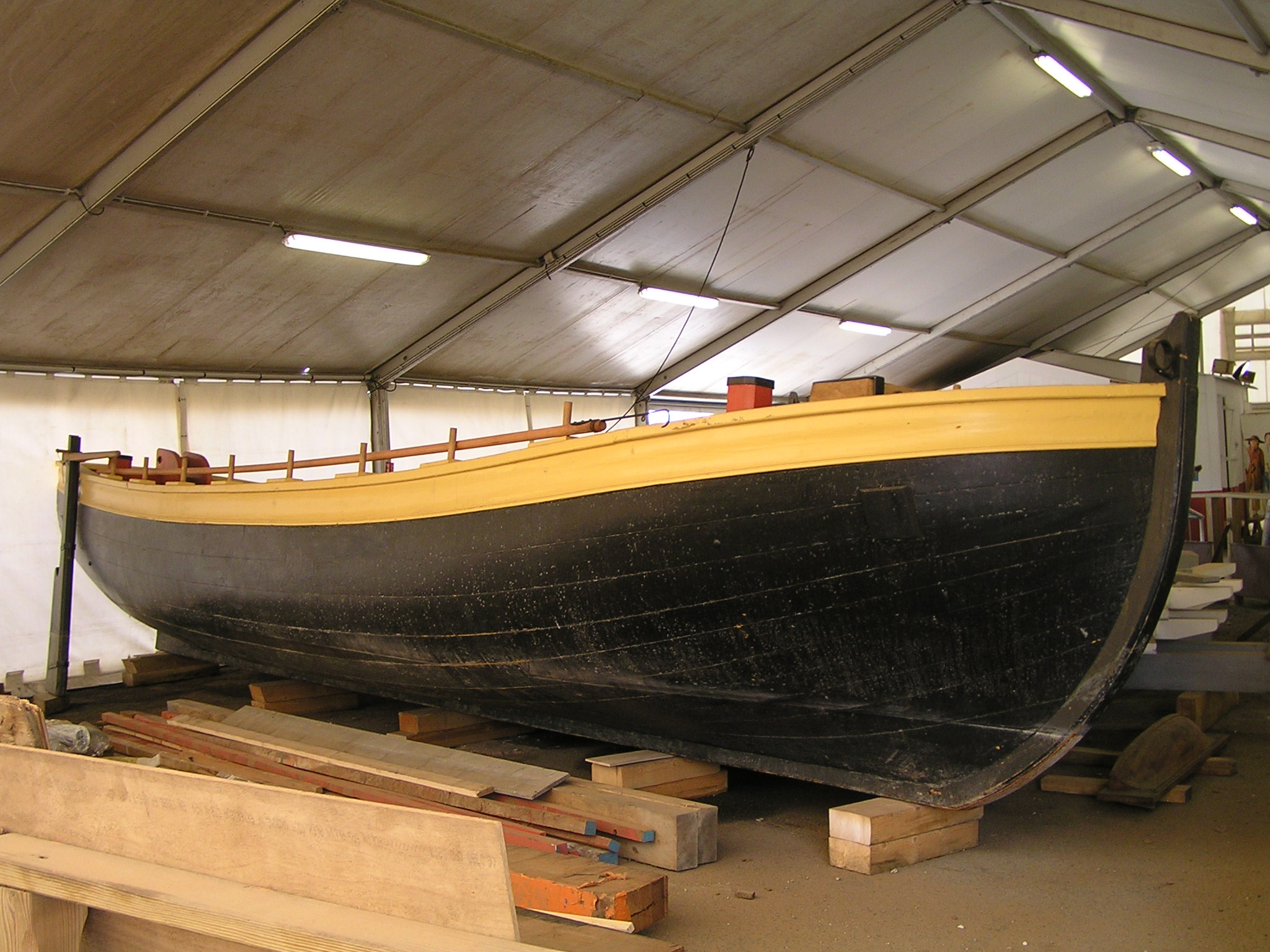 reconstitution d'une chaloupe de l'Hermione, Chantier de l'Hermione à Rochefort en Charente-Maritime